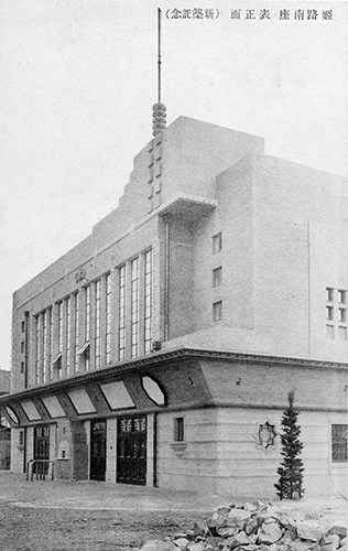 兵庫県姫路市の南座。1964年に姫路OS劇場に改称。